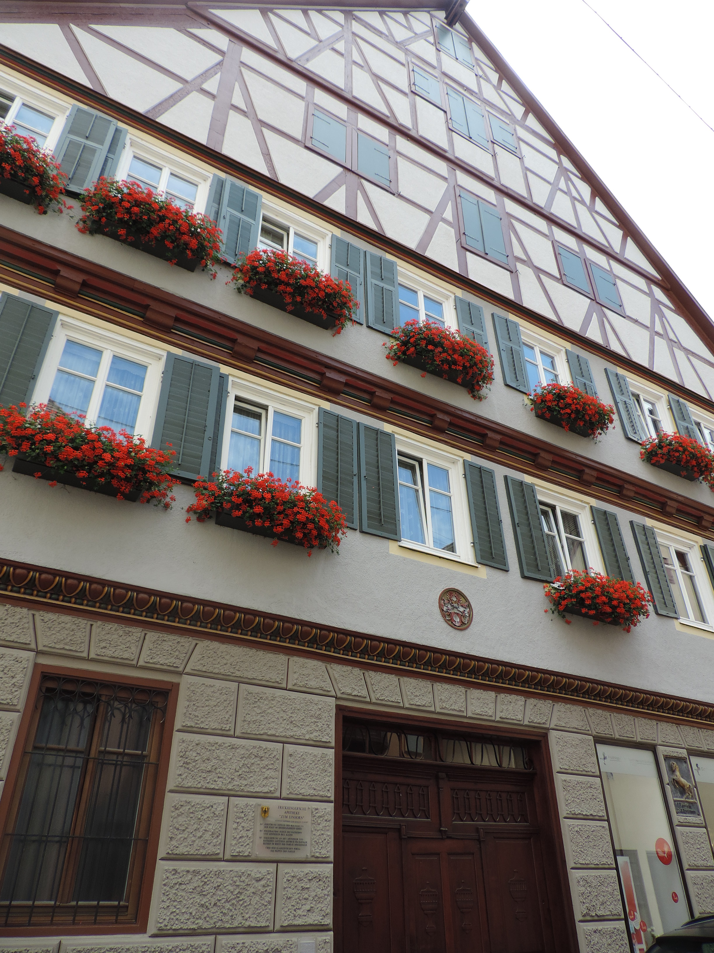 Frickhinger-Haus in Nördlingen